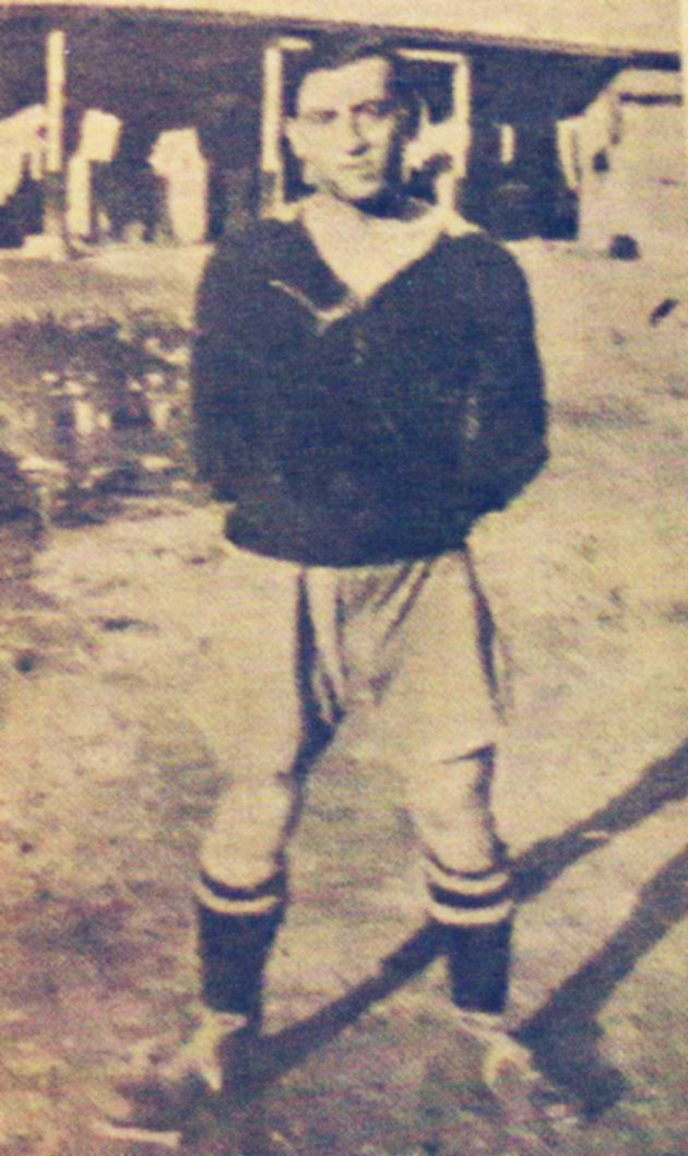 O Λουκάς Πανουργιάς σε νεαρή ηλικία